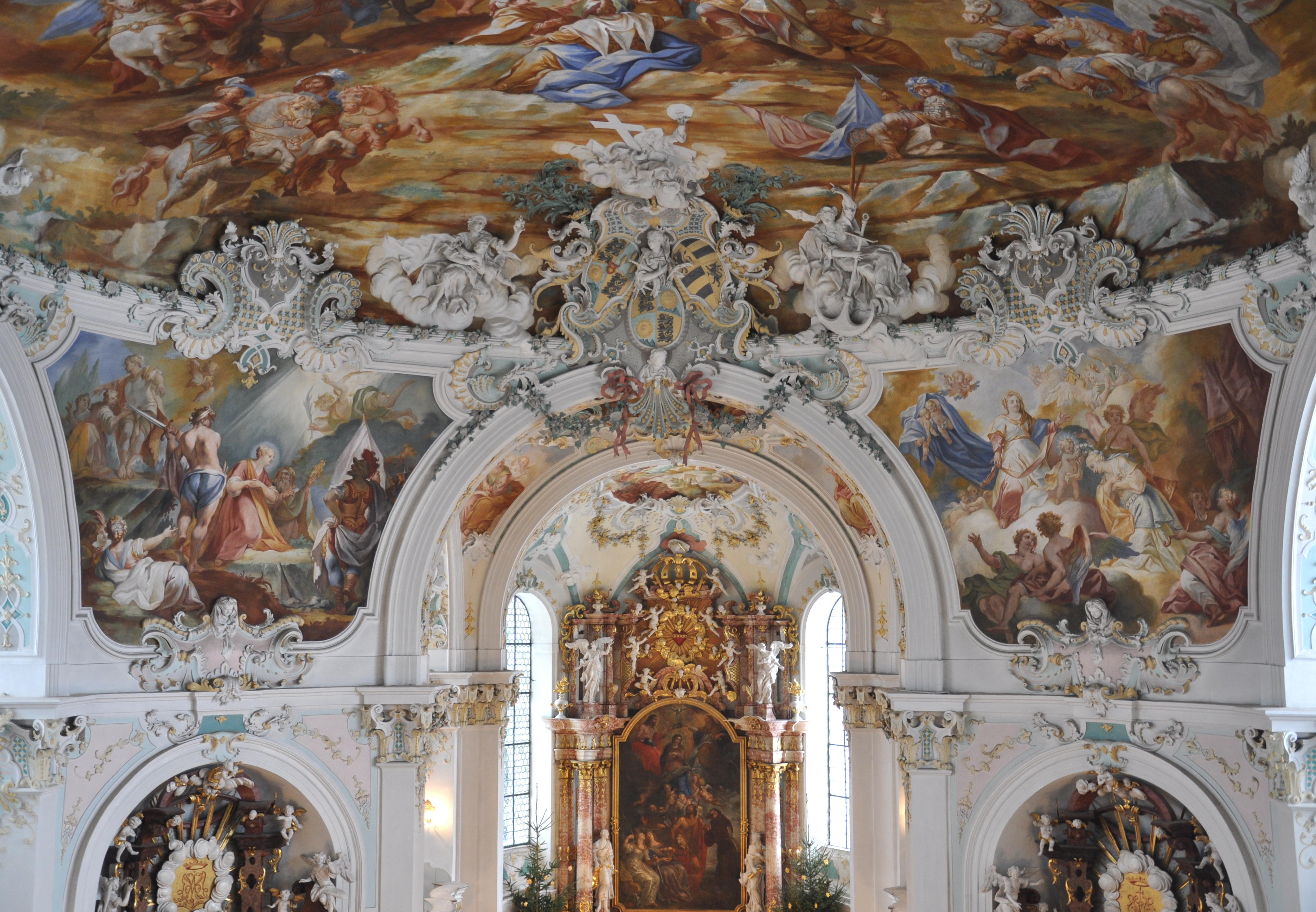 Pfarrkirche St. Katharina, Wolfegg, Landkreis Ravensburg Blick von der Empore auf den Chorbogen und die umgebenden Fresken